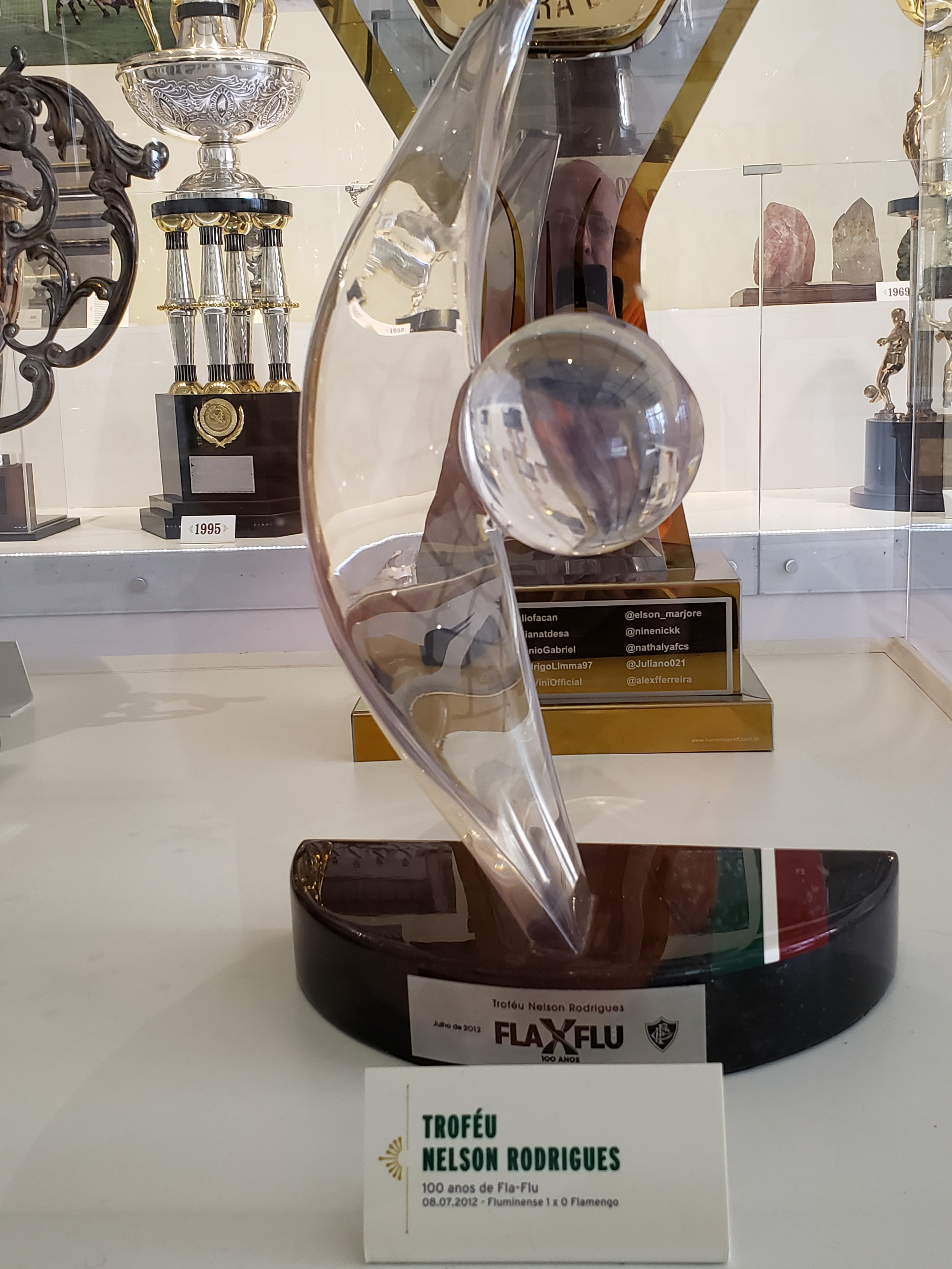 Troféu Nelson Rodrigues 100 anos de Fla-Flu, disputado em 8 de julho de 2012 e vencido pelo Fluminense por 1 a 0, gol de Fred.